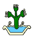 Glifo Náhuatl del municipio de Ajacuba, Hidalgo